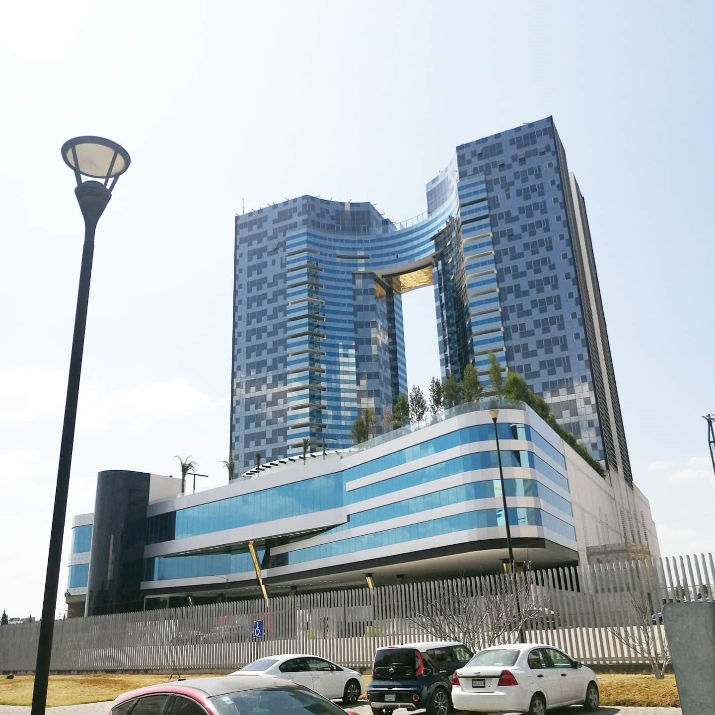 Fachada del complejo Vía Dorada desde el parque David Ben Gurion.